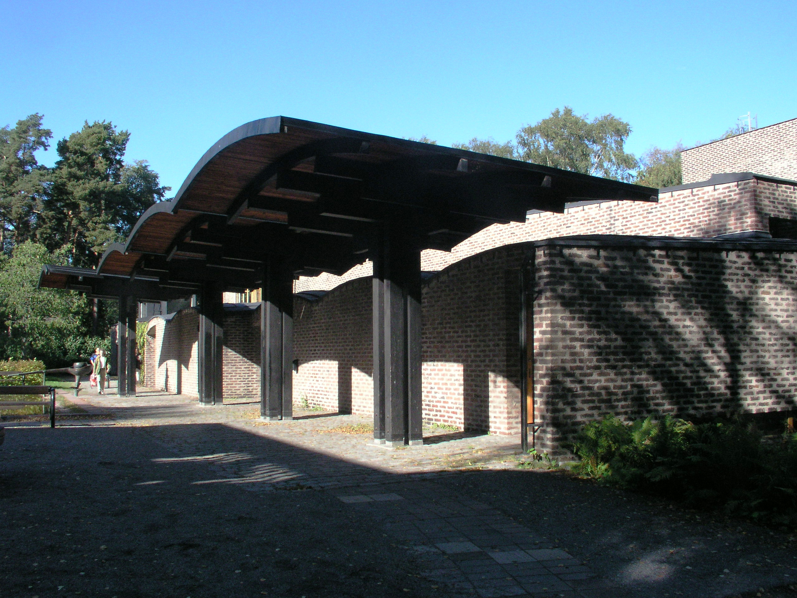 Markuskyrkan /Markus church, Björkhagen, Stockholm, Sweden. The photo was taken the 14th of September 2003 by Håkan Svensson (Xauxa).